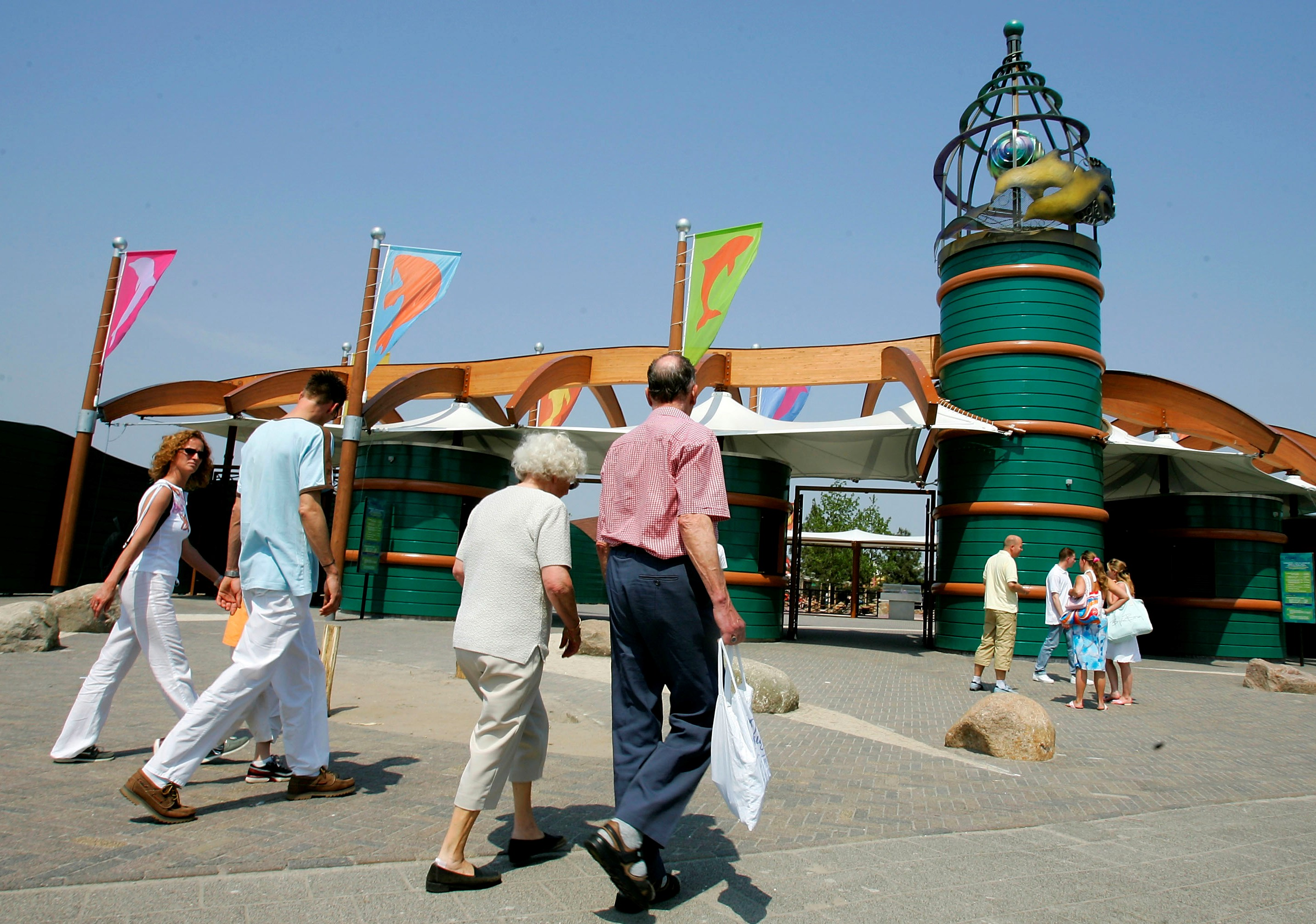 Ingang Dolfinarium